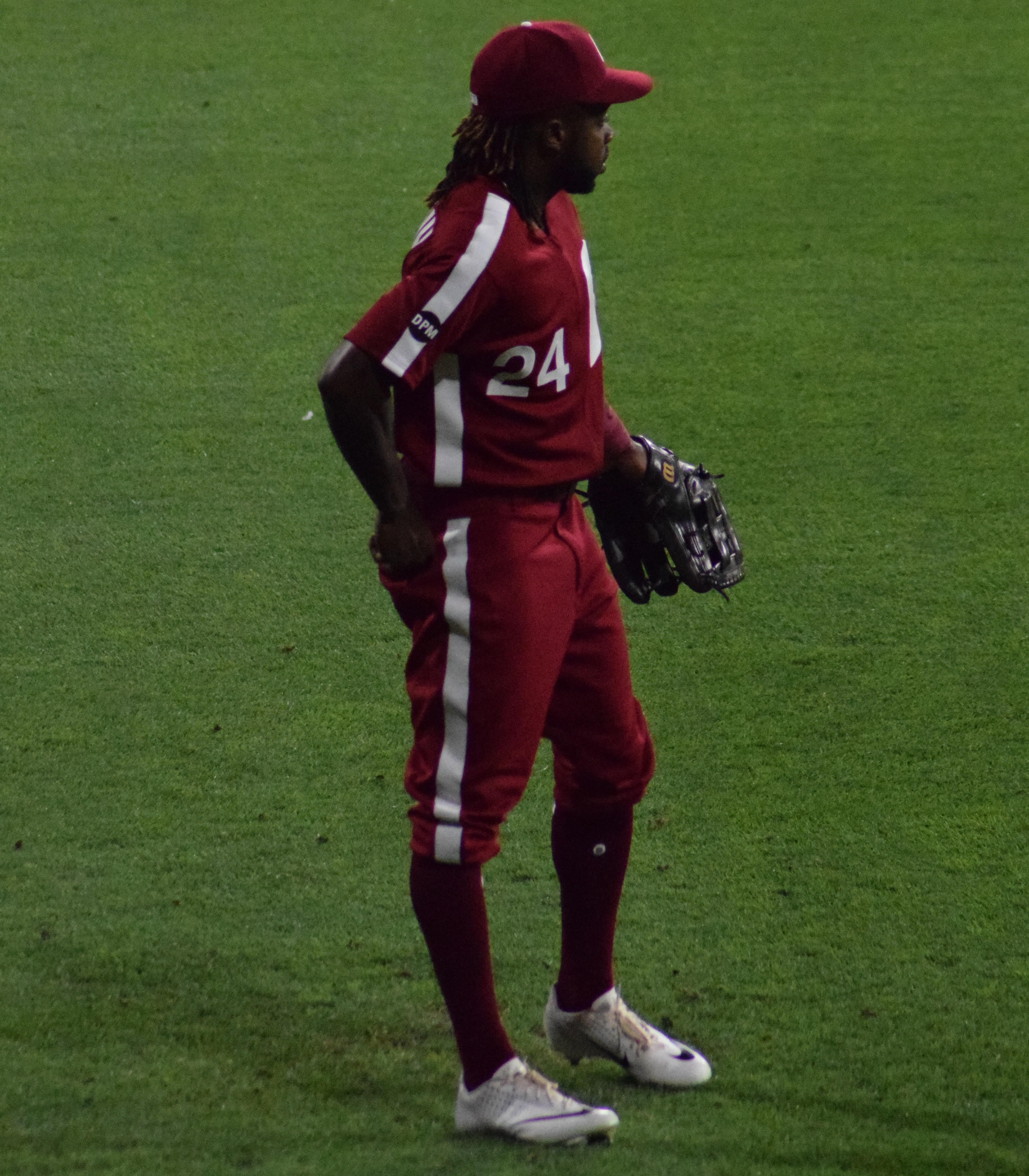 Roman Quinn